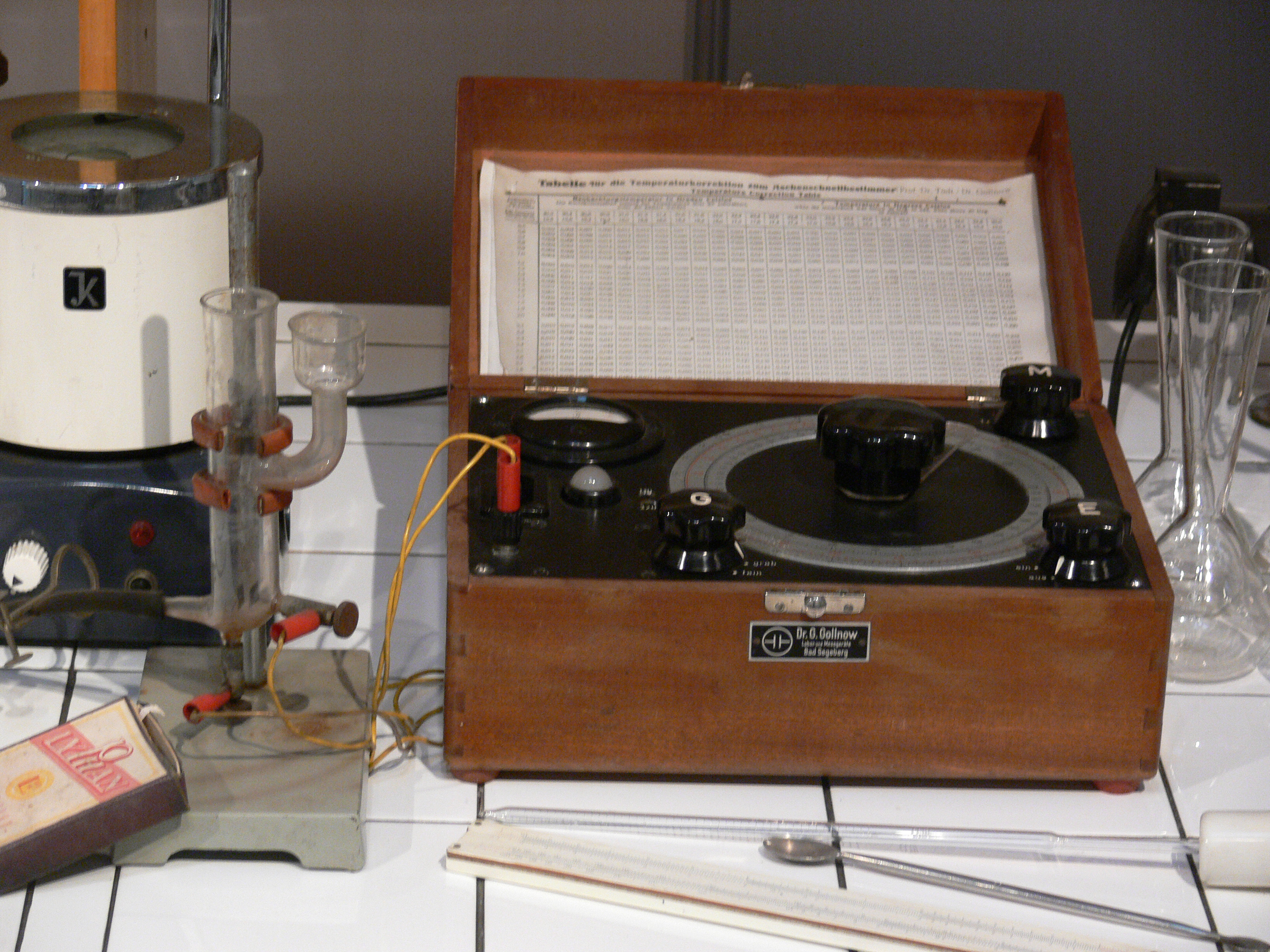 Ascheschnellbestimmer nach Tödt, Hersteller: Dr. G. Gollnow, um 1955, Zucker-Museum Berlin (zur Messung des Gehalts an salzartigen Bestandteilen bei der Rübenzuckerherstellung durch die Messung der elektrischen Leitfähigkeit; der Begriff „Asche“ wurde aus Tradition beibehalten); links: Messzellle, rechts: Kontrolleinheit